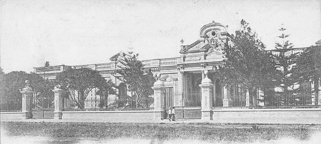 Edificio del Ministerio de Gobierno de la Provincia de Buenos Aires, obra del ingeniero Benoit. Demolido para construir el actual Ministerio de Infraestuctura. La Plata, Argentina.